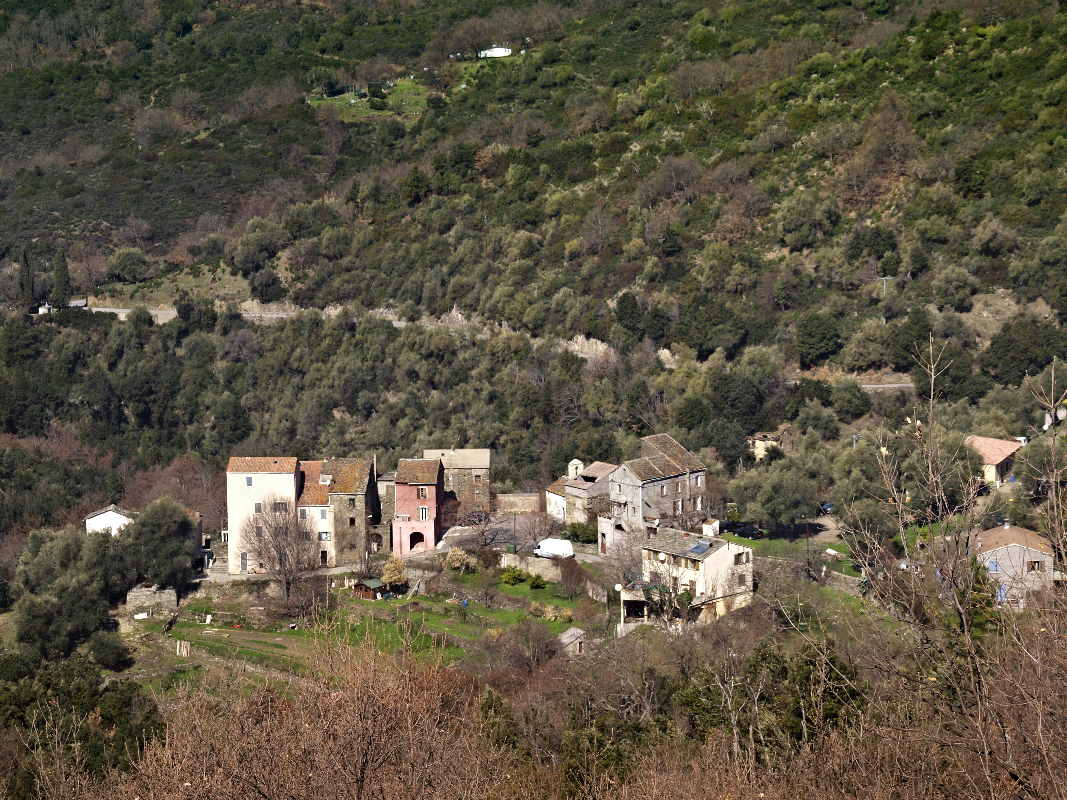 Bisinchi, Rustinu (Corse) - Hameau de Fornu Corsu: Bisinchi, Rustinu (Corsica) - Paesolu di u Fornu